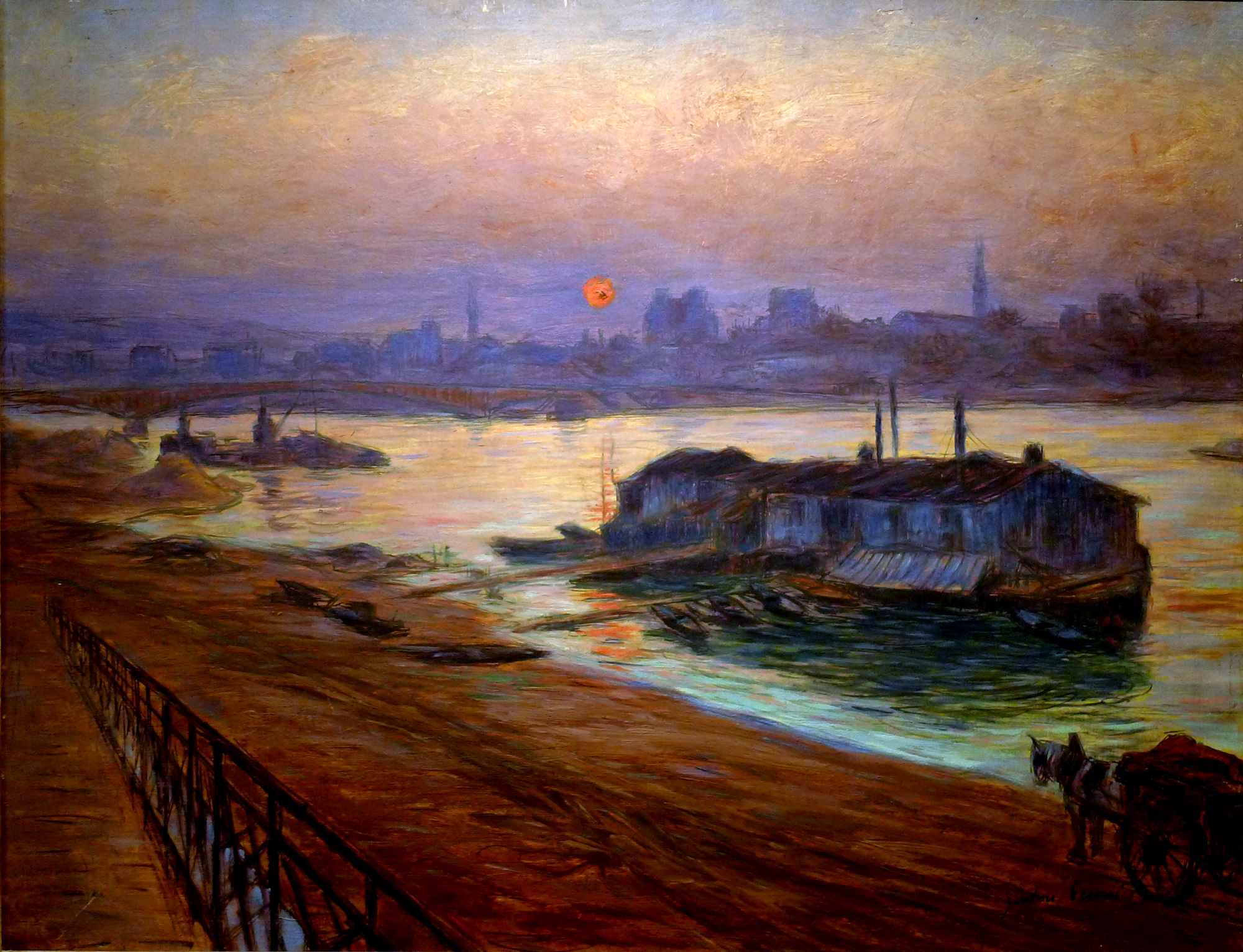 Vue des confins de Paris représentant le monde du travail, les usines et les activités portuaires ; en arrière-plan le pont Mirabeau et le coucher de Soleil sur Auteuil.